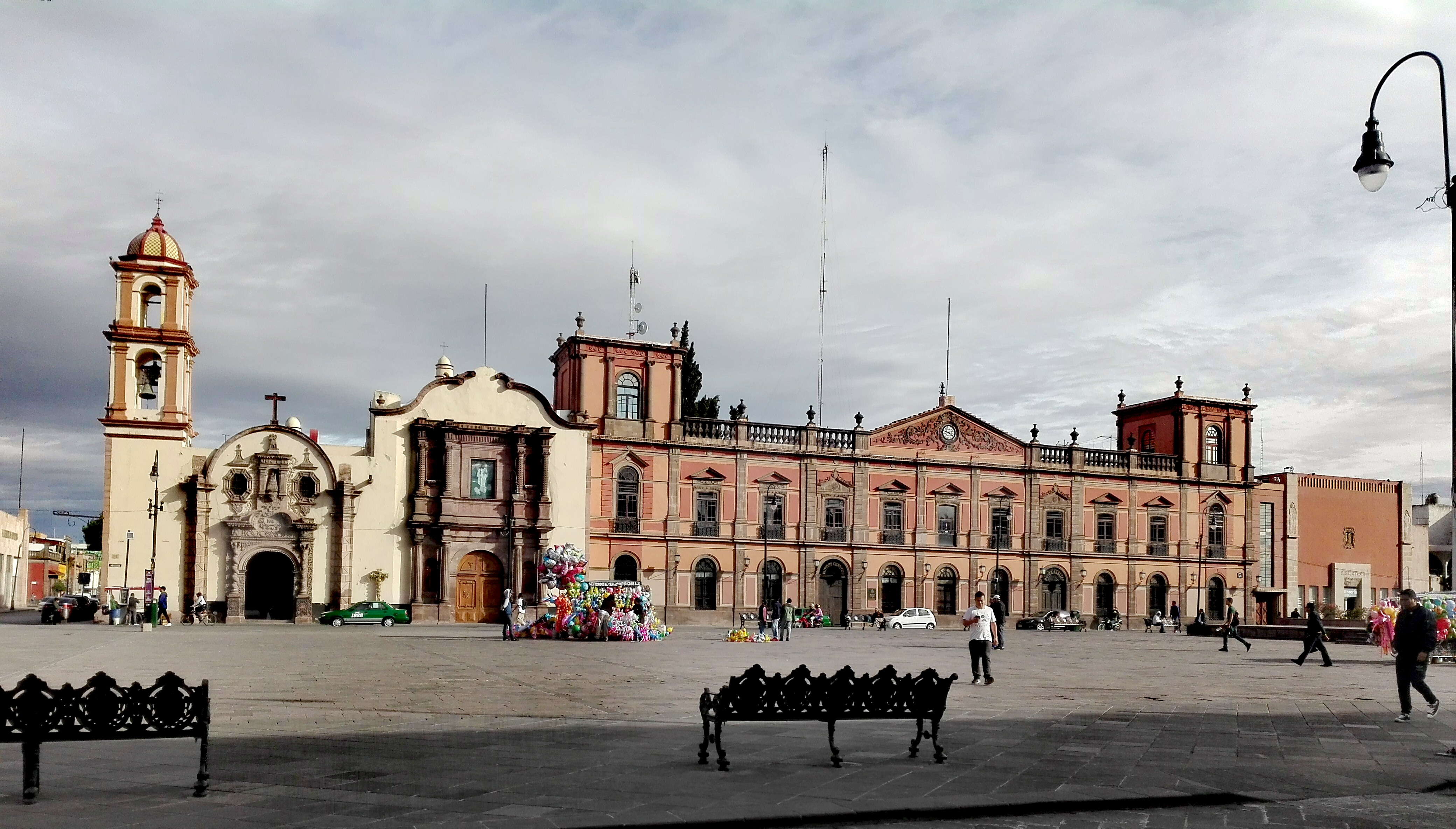 Plaza de los Fundadores, San Luis Potosí, México